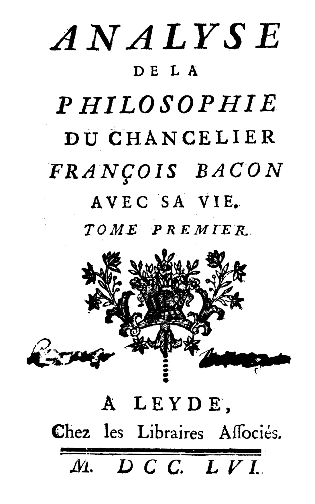 Frontespizio